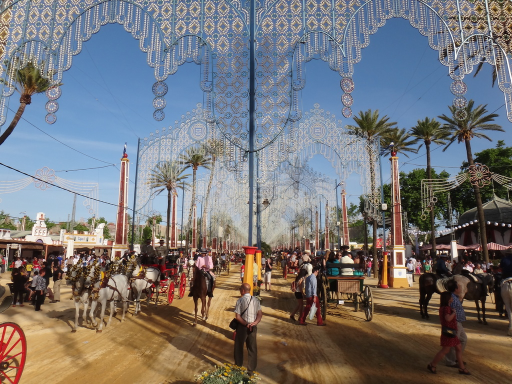 Paseo Principal Feria del Caballo 2012. Jerez (Andalucía, España)